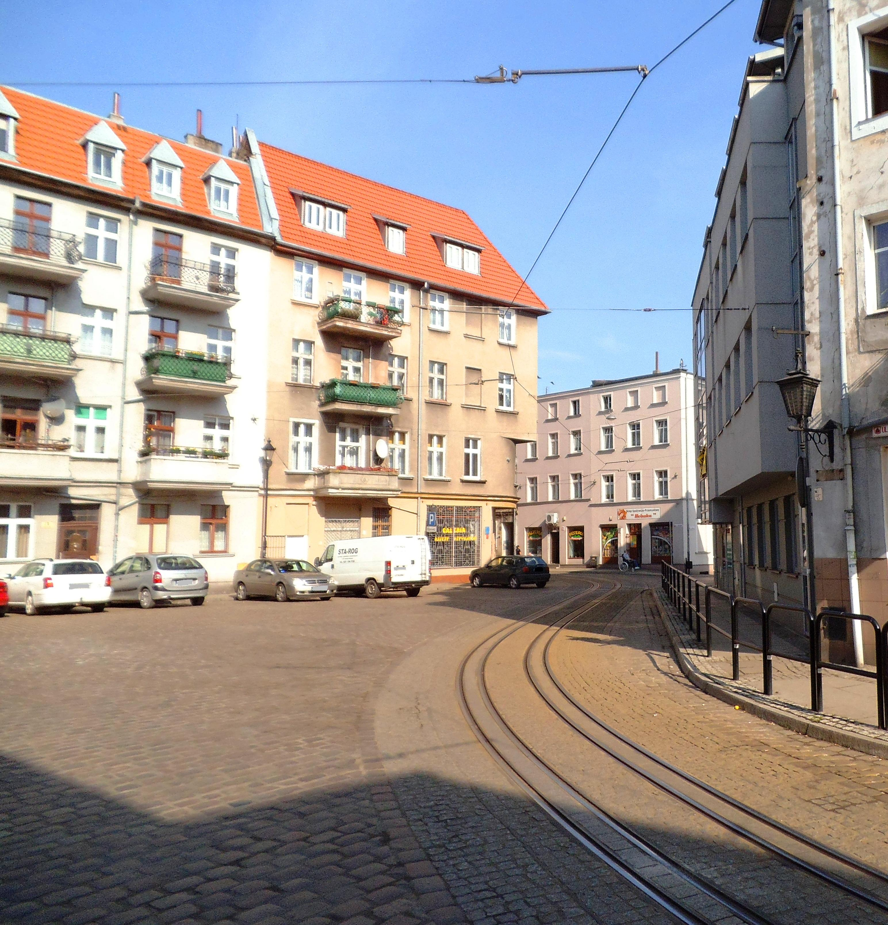 Ulica Szkolna w Grudziądzu